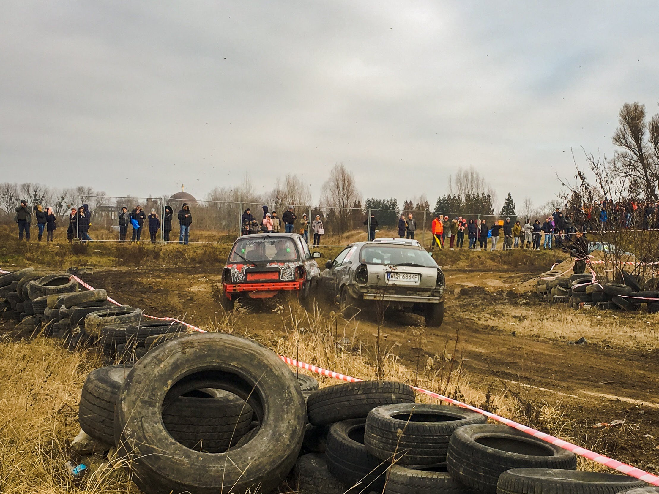 Starcie podczas Wrak Race Micra vs Civic